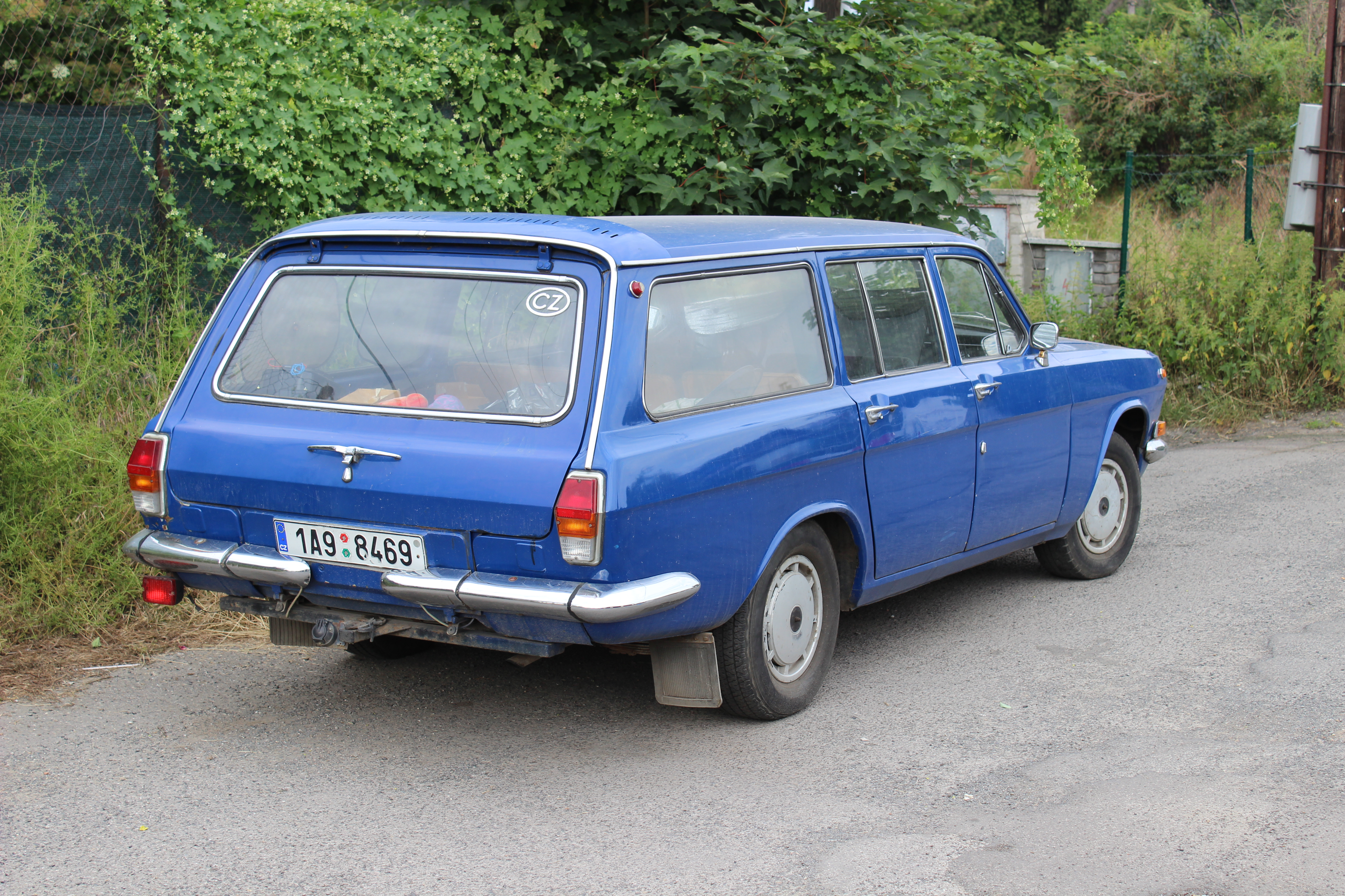 Automobil Volha na pražském Bohdalci.